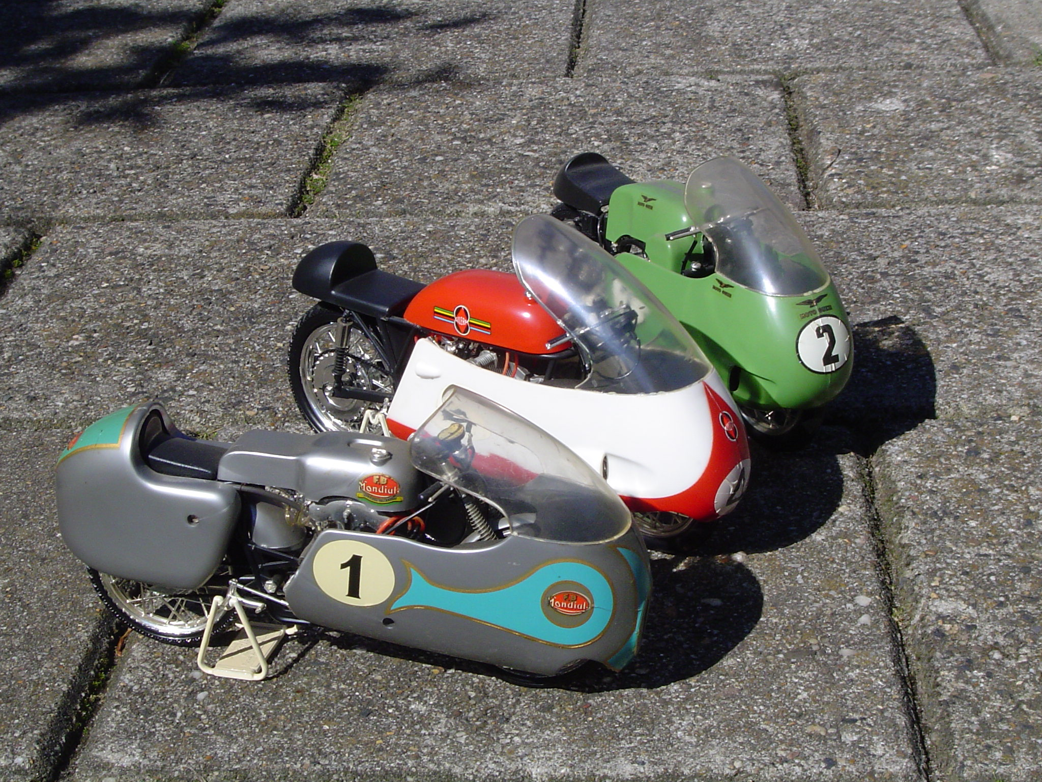 Badkuipen